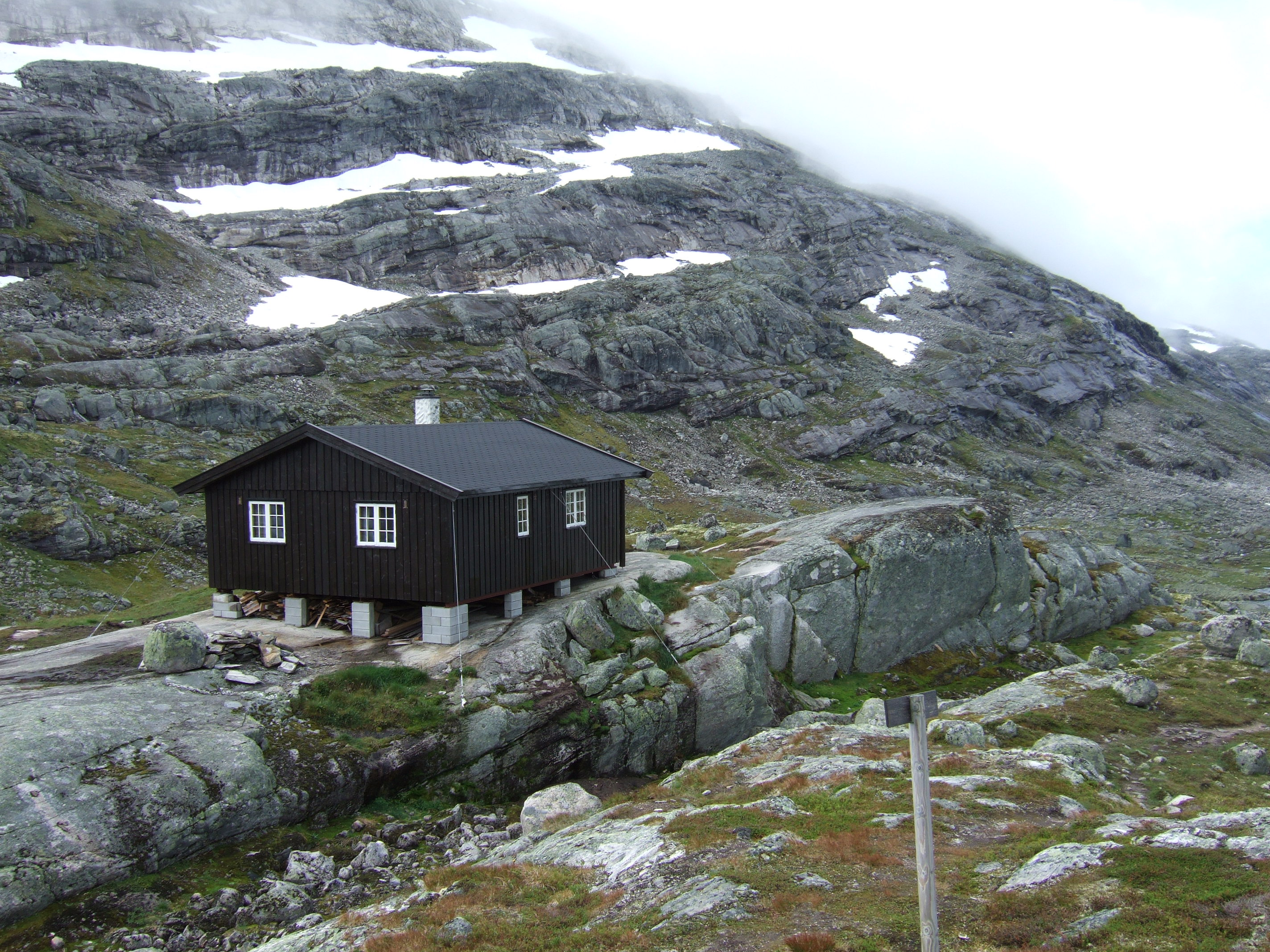 Sprongdalshytta